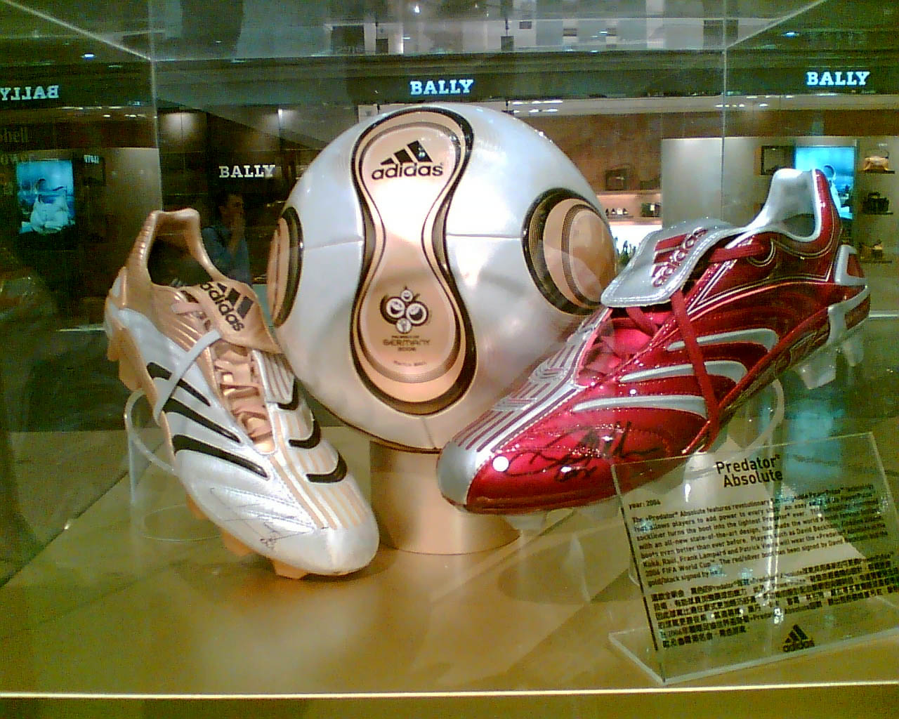 中文（香港）: 愛迪達Teamgeist。用Photoshop Elements調整色彩及對比。